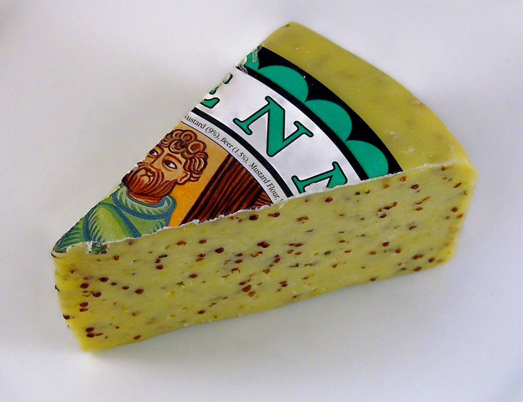 Y Fenni Cheese